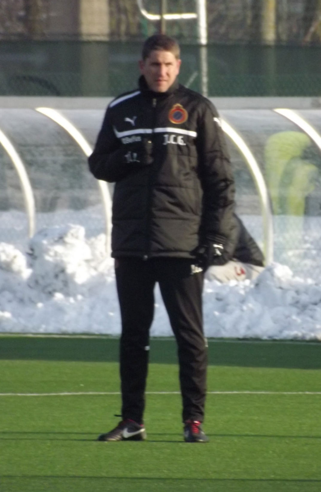 Trainer Juan Carlos Garrido tijdens een veldtraining van Club Brugge op 16 januari 2013